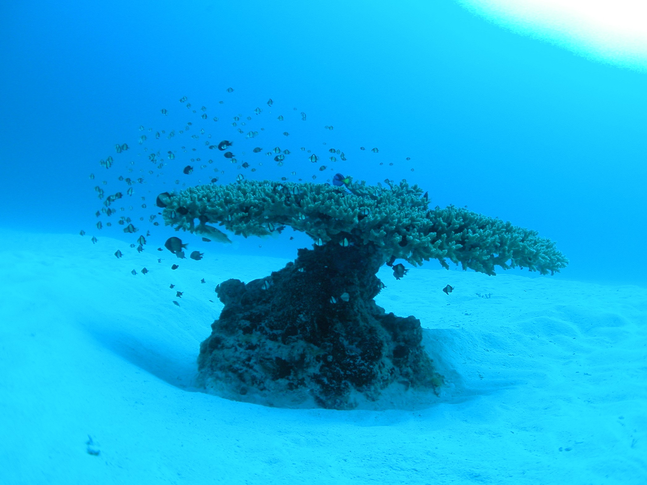 Motobu Okinawa-ken (Prefecture), Japan %u6C96%u7E04%u770C%u672C%u90E8%u753A